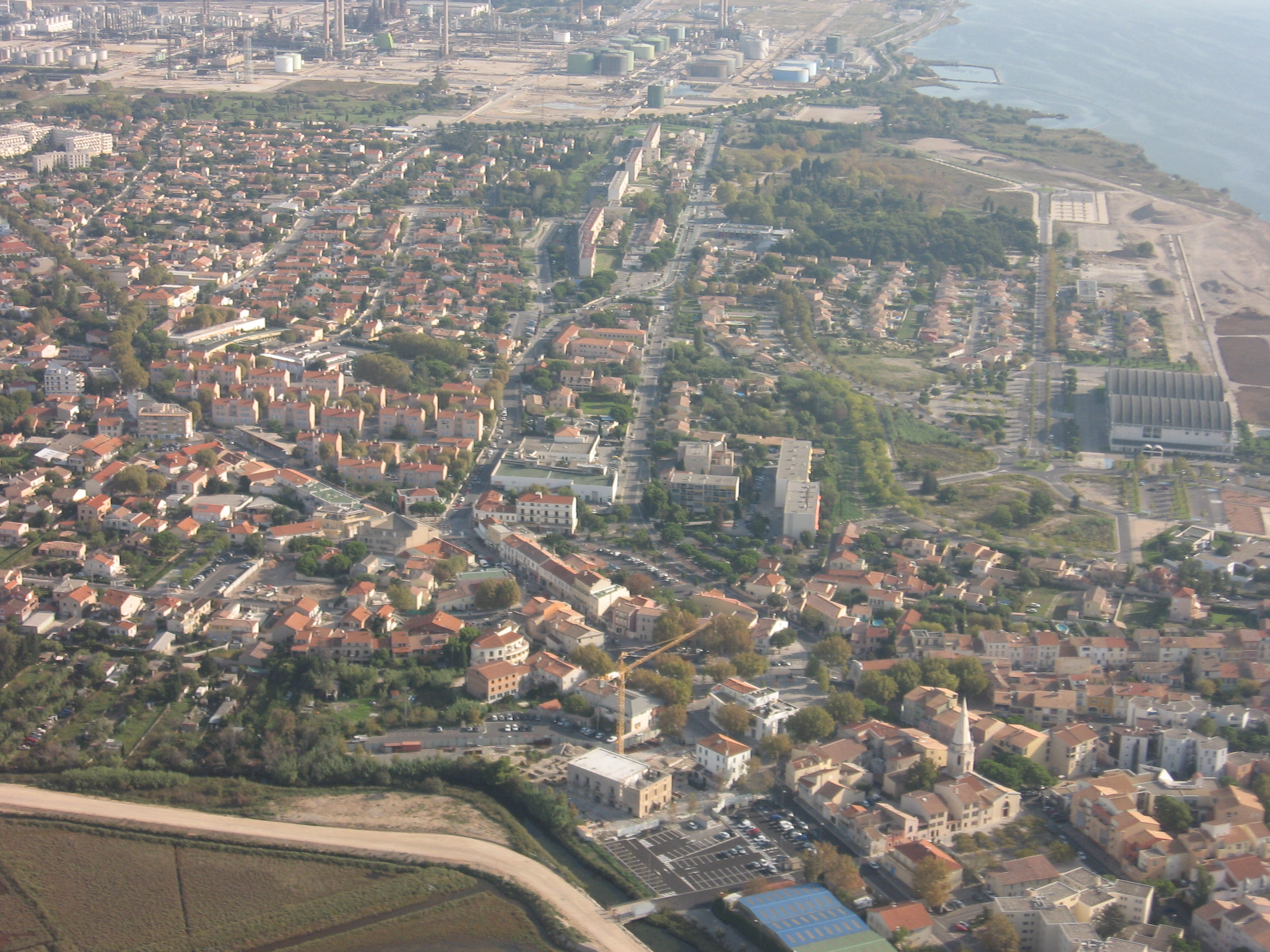 View on Berre-l'Étang